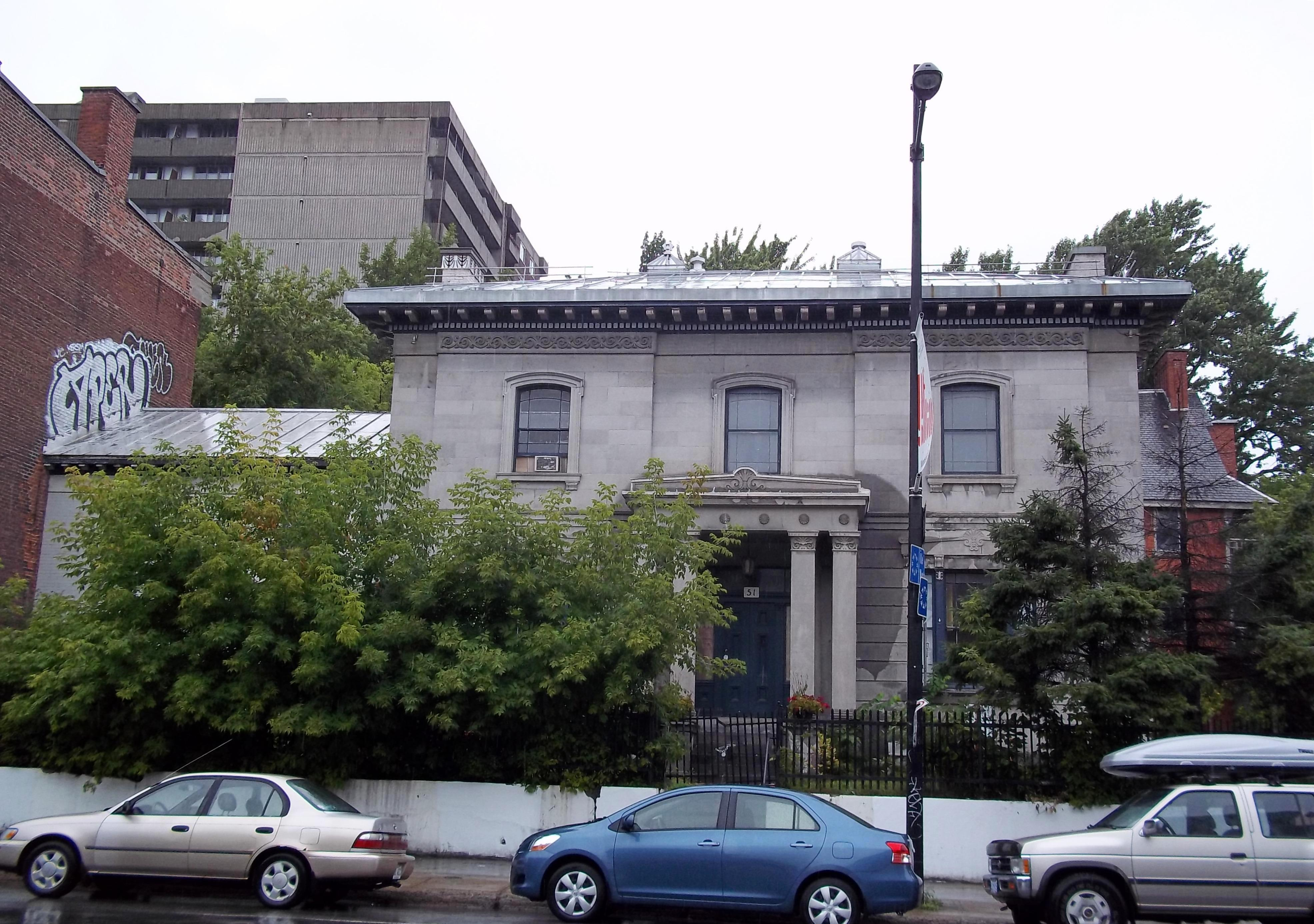 Maison William Collis-Meredith (Maison William-Notman), 51, rue Sherbrooke Ouest, Montréal Grand répertoire du patrimoine bâti de Montréal